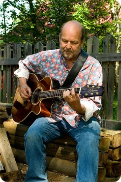 Lasse Wellander